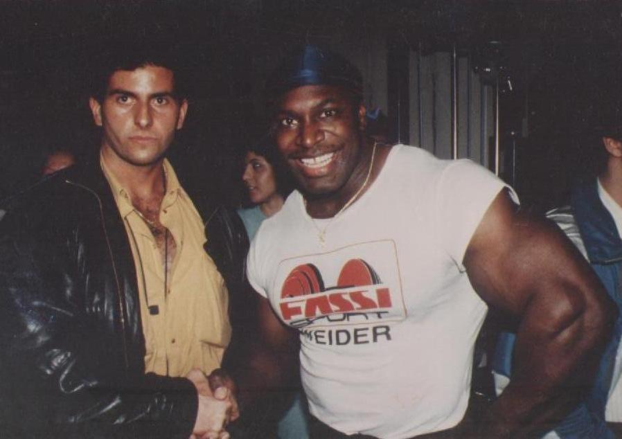 7-4-1988, Paolo Tassetto con Lee Haney, Mr. Olympia dal 1984 al 1991